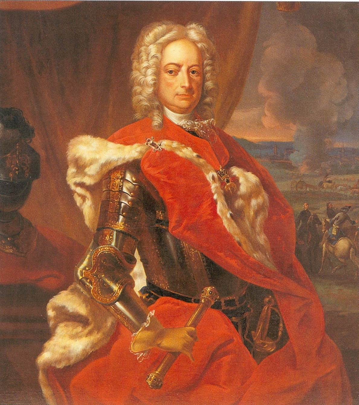 Pálffy János V. (1663-1751)